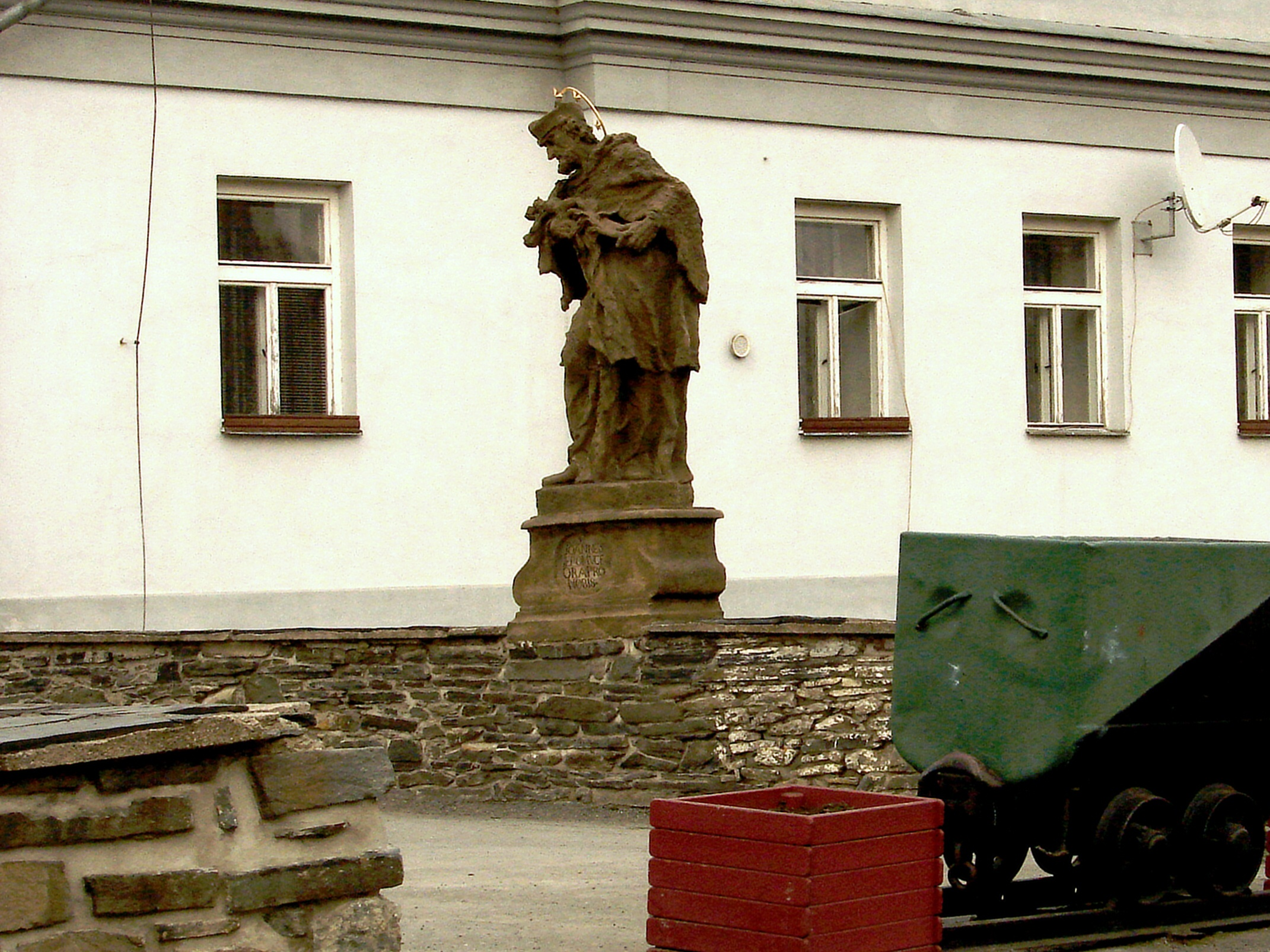 Silniční most kamenný se sochou sv. Jana Nepomuckého (Budišov nad Budišovkou), přes říčku Budišovku, Budišov nad Budišovkou